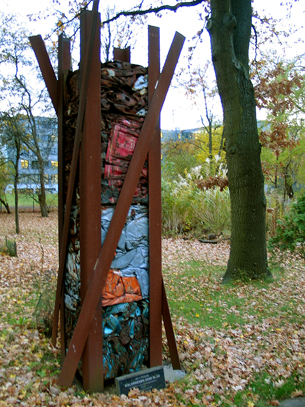 Die Plastik Waldfrieden 2000 Nr. III von János Nádasdy; hier der Blick an einem Herbstabend in Richtung Süden ...